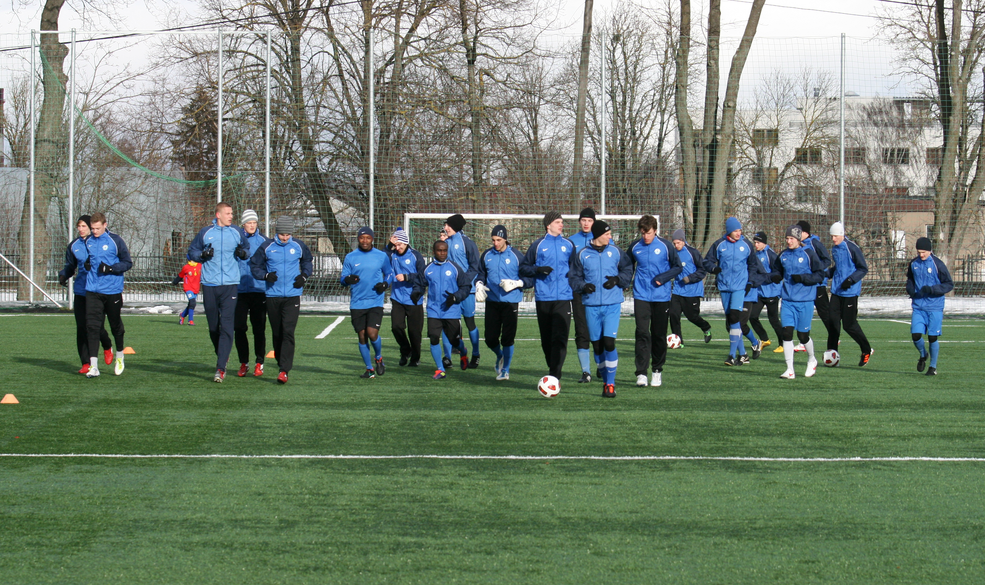 Tartu Tammeka meeskond 2012. aasta hooaja ees